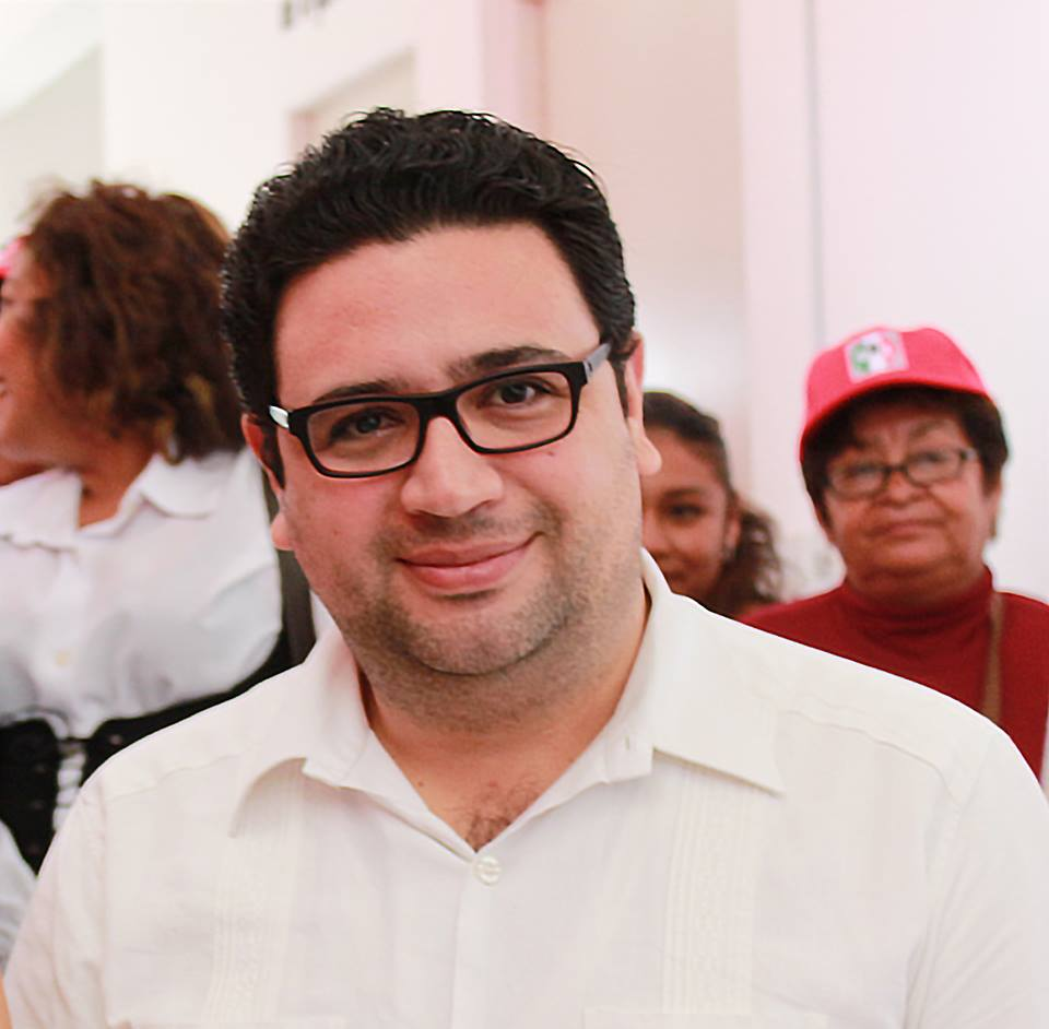 NOE